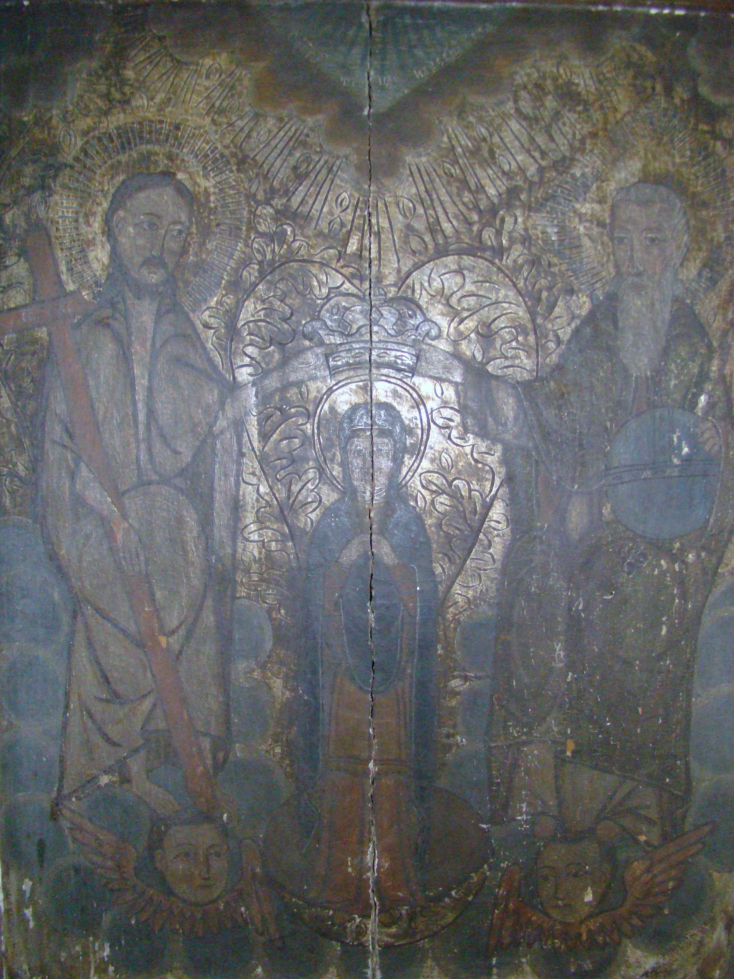 Biserica de lemn "Sfântul Nicolae" (a Nistoreştilor) , oraş SĂLIŞTEA DE SUS